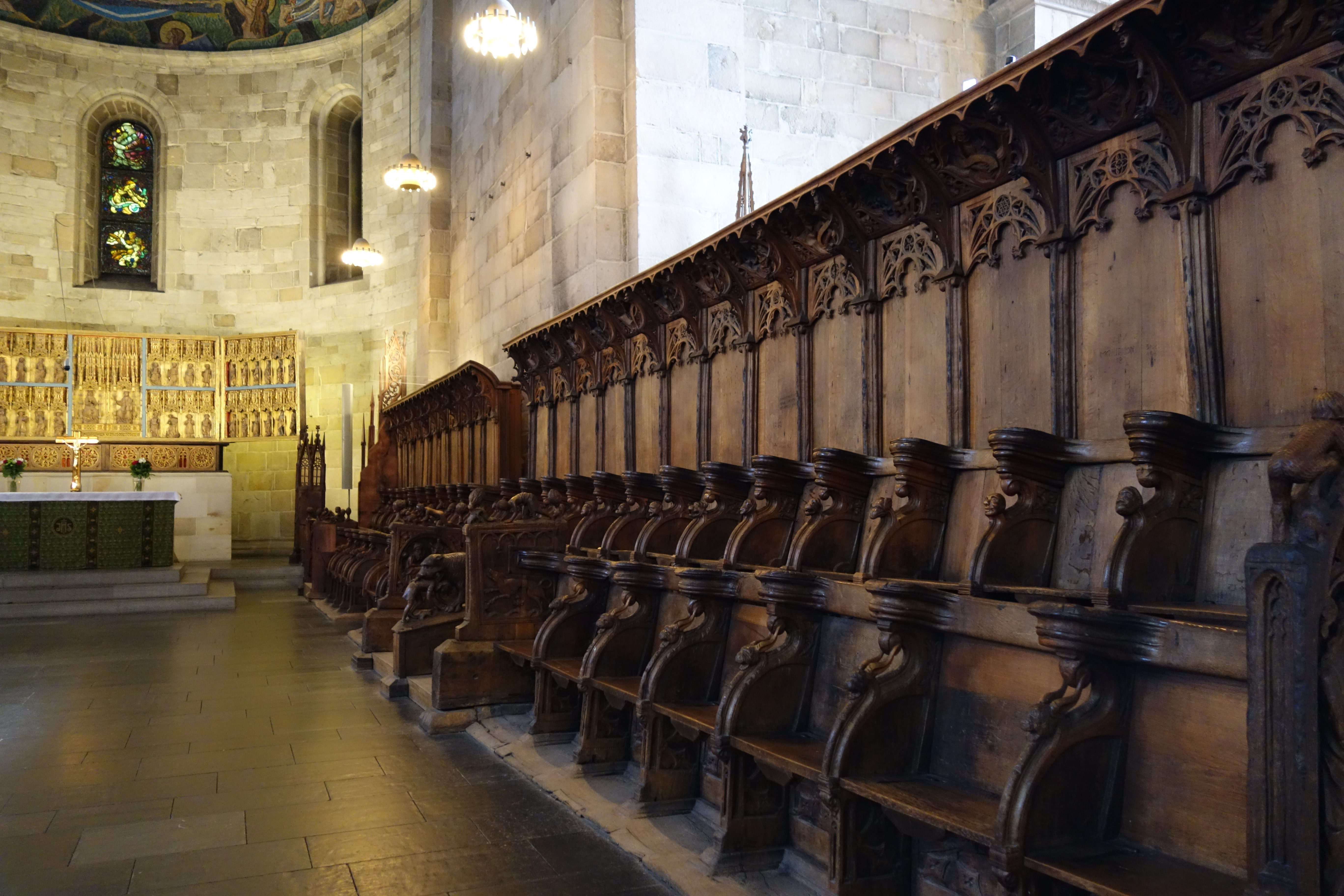 Lunds domkyrka (Domkyrkan 1)